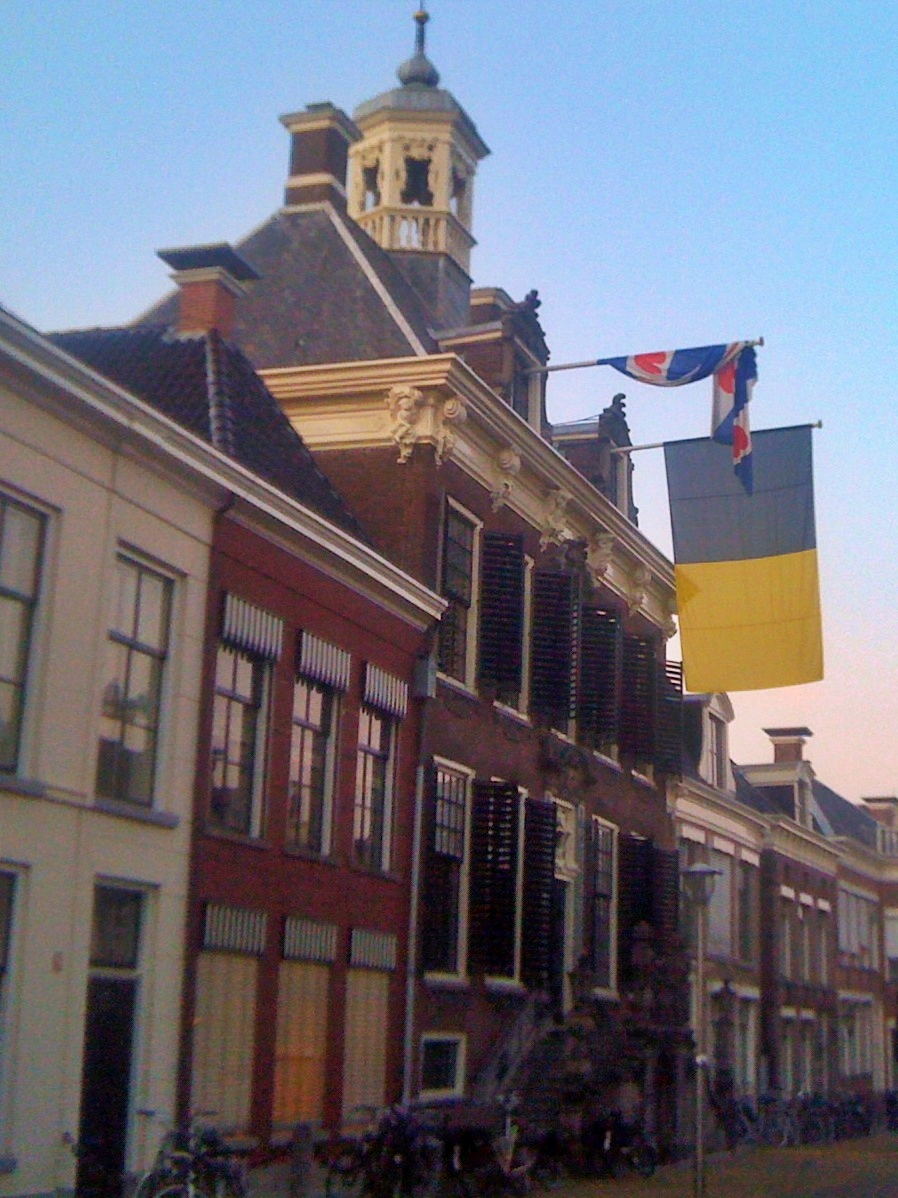 Stadhuis Sneek met vlagvertoon, Sneekweek 2011